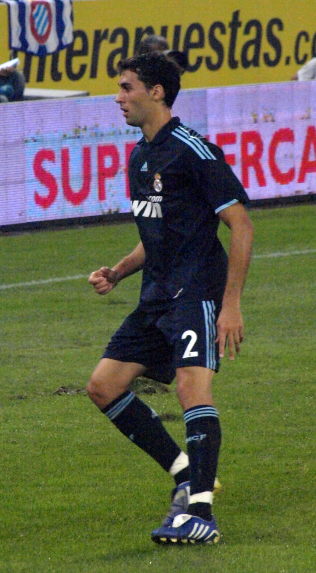 Álvaro Arbeloa en el partido que enfrentó al Real Madrid con el RCD Español en el Estadio de Cornellá-El Prat de la primera vuelta de La Liga 2009/10.